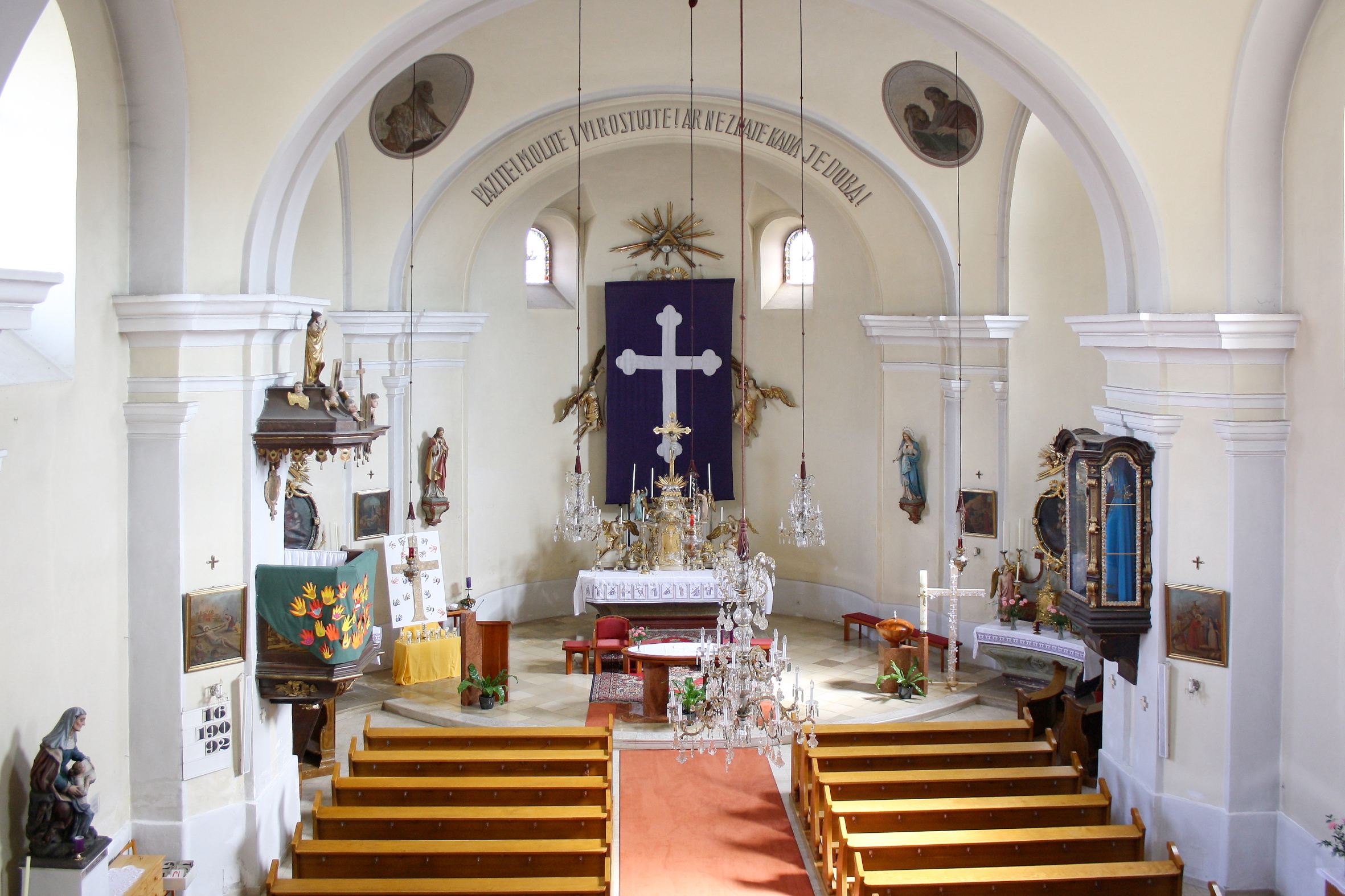 Die Innenansicht der röm.-kath. Pfarrkirche hl. Anna in der burgenländischen Marktgemeinde Hornstein.